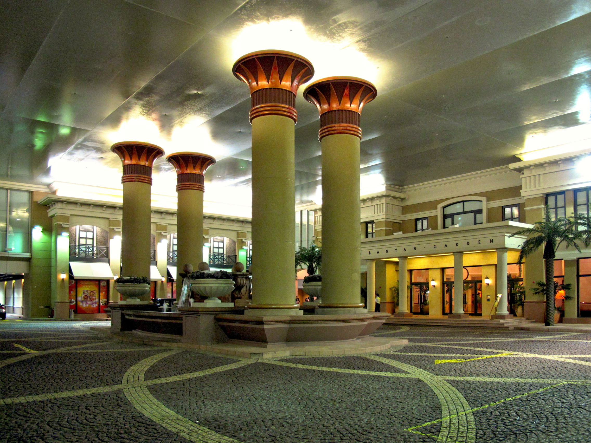 Banyan Garden Residential Entrance